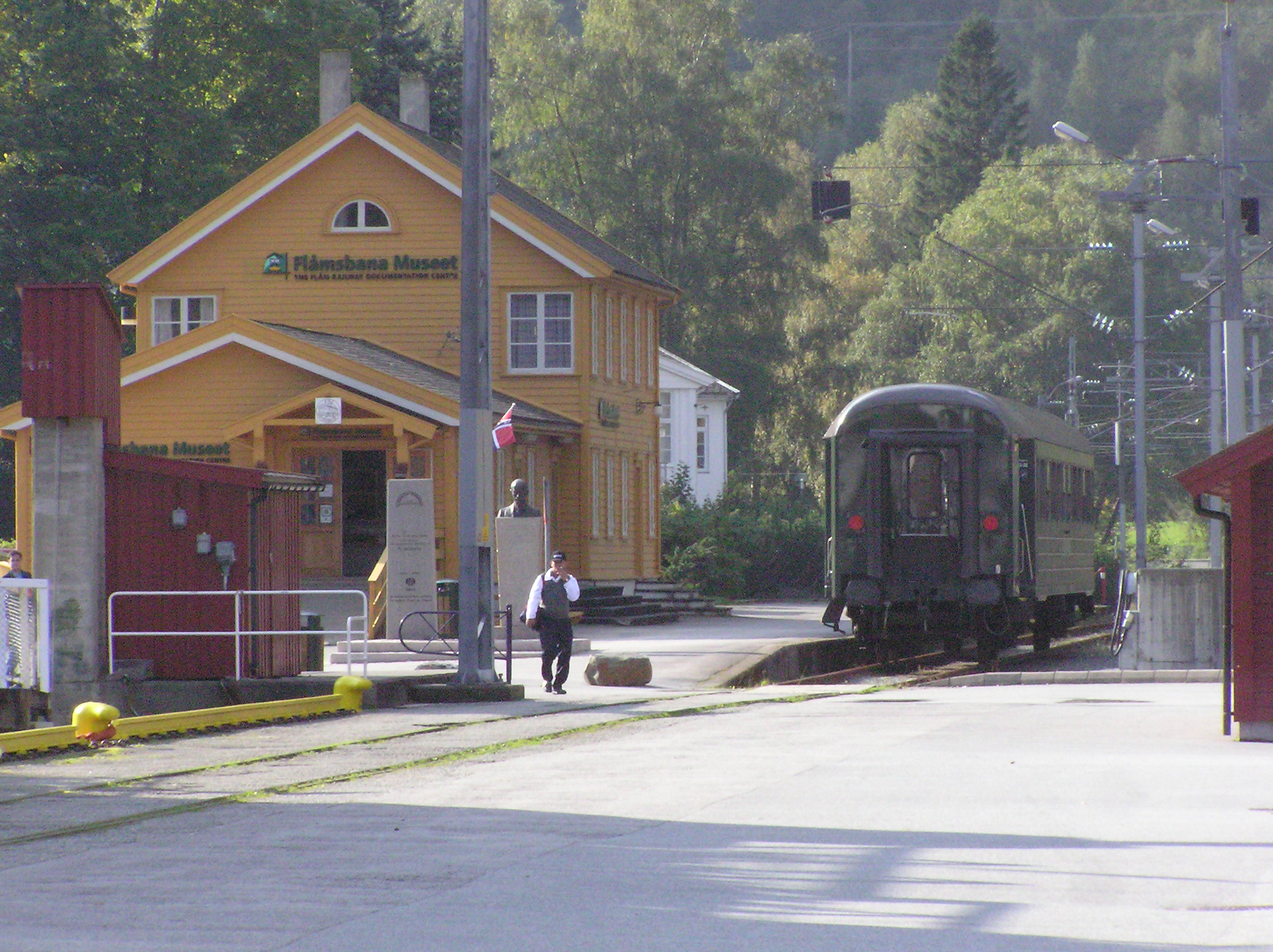 Sign